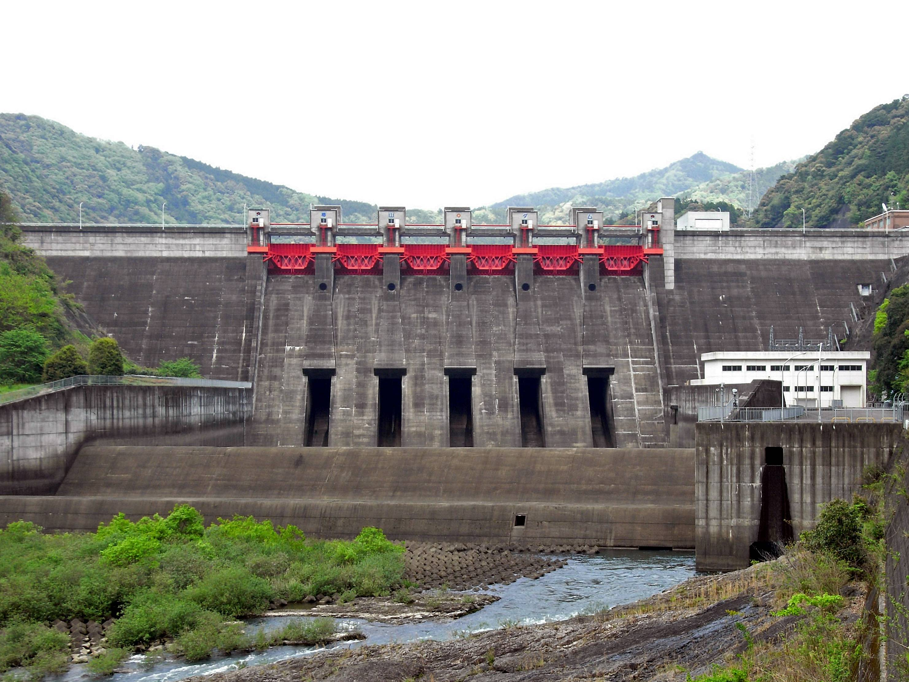 Dam